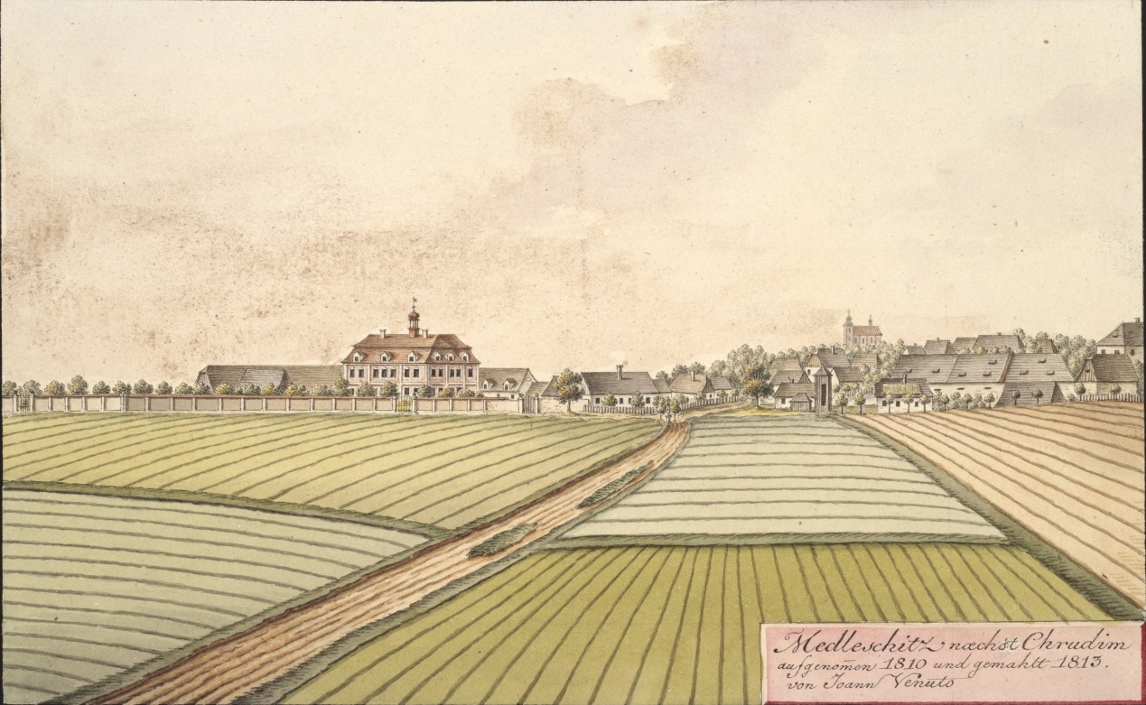 Medleschitz naechst Chrudim aufgenommen 1810 und gemahlt 1813 von Joann Venuto